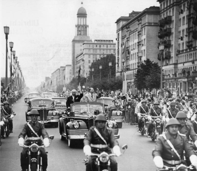 Berlin, Fahrt von Chruschtschow und Ulbricht Zentralbild, 28.6.1963 70. Geburtstag Walter Ulbrichts N.S. Chruschtschow in Berlin eingetroffen Der Erste Sekretaer des ZK der KPdSU und Vorsitzende des Ministerrates der UdSSR, N.S. Chruschtschow, ist anlaesslich des 70. Geburtstages des Ersten Sekretaers des ZK der SED und Vorsitzenden des Staatsrates der DDR, Walter Ulbricht, am 28. Juni 1963 zu einem Freundschaftsbesuch in der DDR auf dem Flugplatz Berlin-Schoenefeld eingetroffen. UBz.: Von Zehntausenden Berlinern wurden N.S. Chruschtschow und Walter Ulbircht bei ihrer Fahrt vom Flugplatz durch die Strassen Berlins begeistert umjubelt. - Hier in der Karl-Marx-Allee.- [Berlin, Karl-Marx-Allee.- Fahrt von Nikita Chruschtschow und Walter Ulbricht in offenem Wagen mit Polizeieskorte auf Motorrädern] Abgebildete Personen: Chruschtschow, Nikita S.: Ministerpräsident, erster Sekretär der KP, Sowjetunion (GND 118638378) Ulbricht, Walter: Staatsratsvorsitzender, Erster Sekretär des Zentralkomitees (ZK) der SED, Vorsitzender des Nationalen Verteidigungsrates, DDR